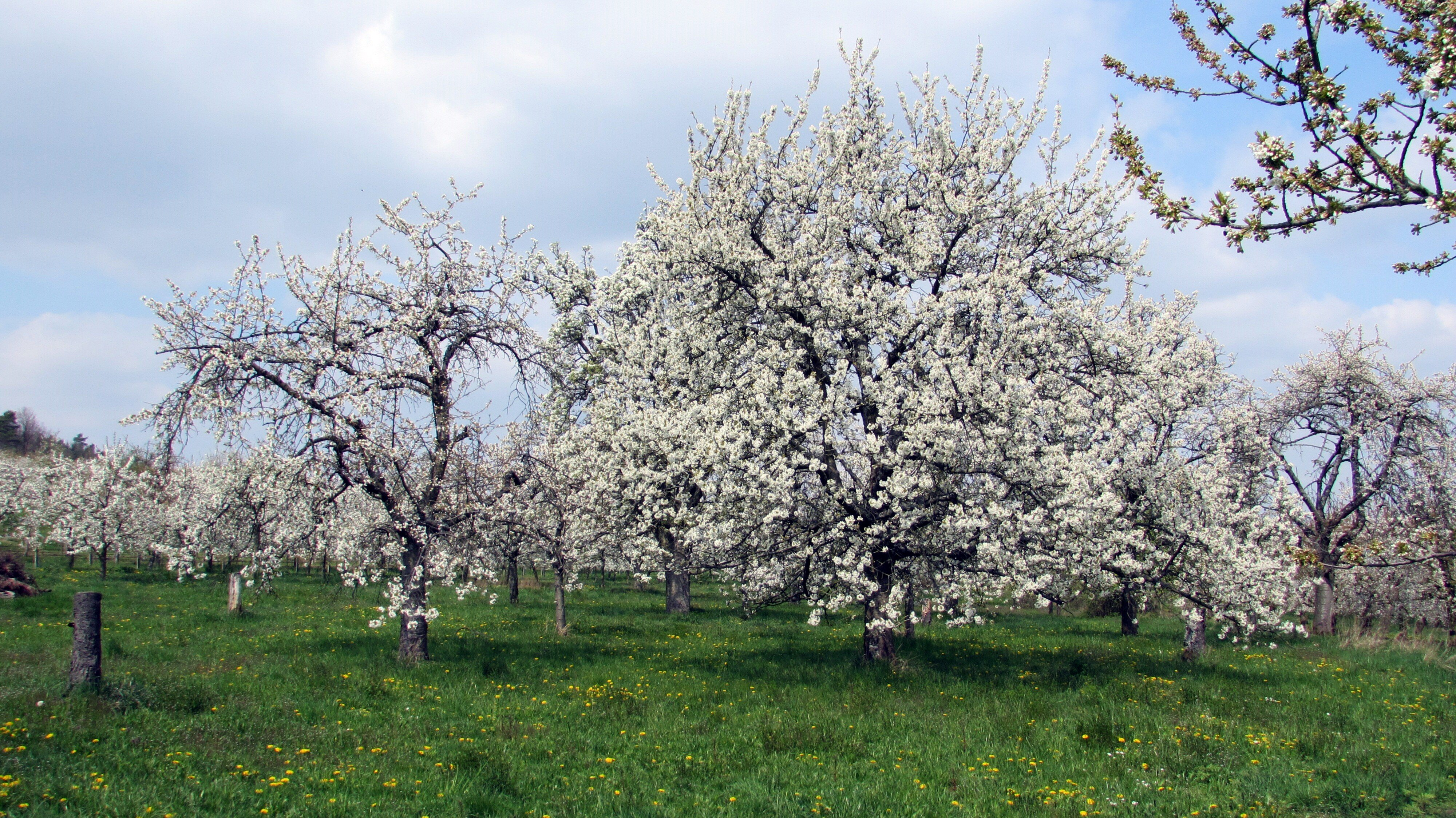 Friedberg-OckstadtBlütezeitApril2019